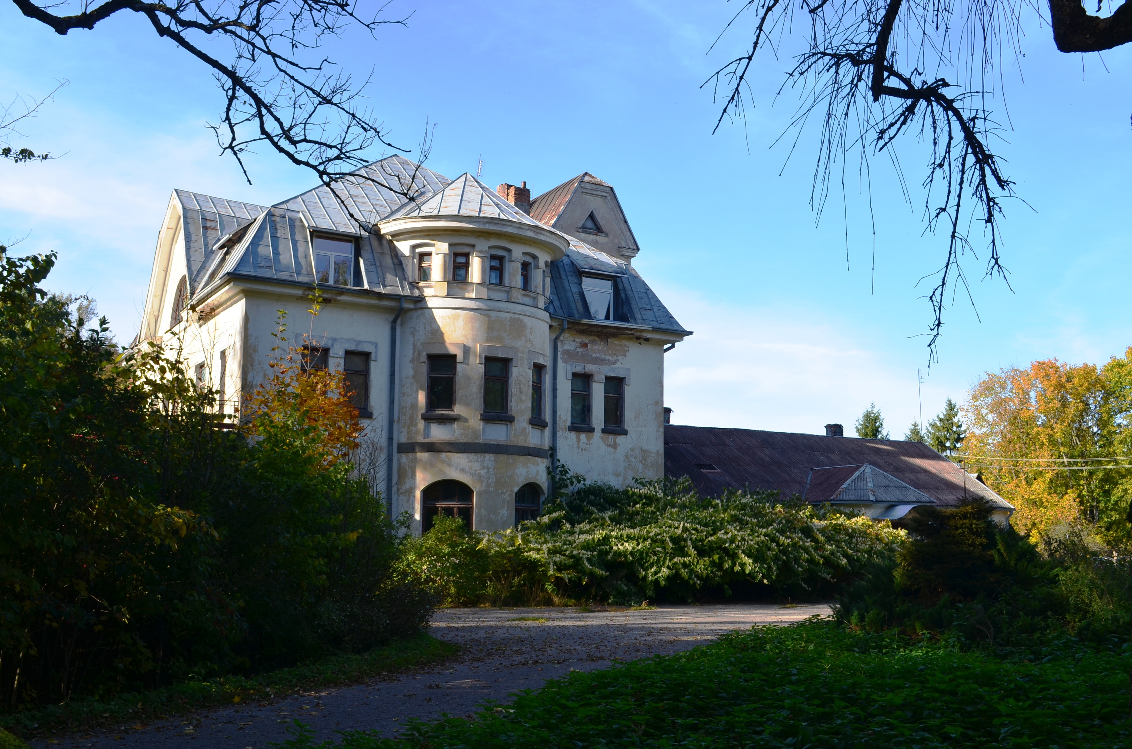 Terespolio dvaro rūmai, Gudžiūnų sen., Kėdainių raj.